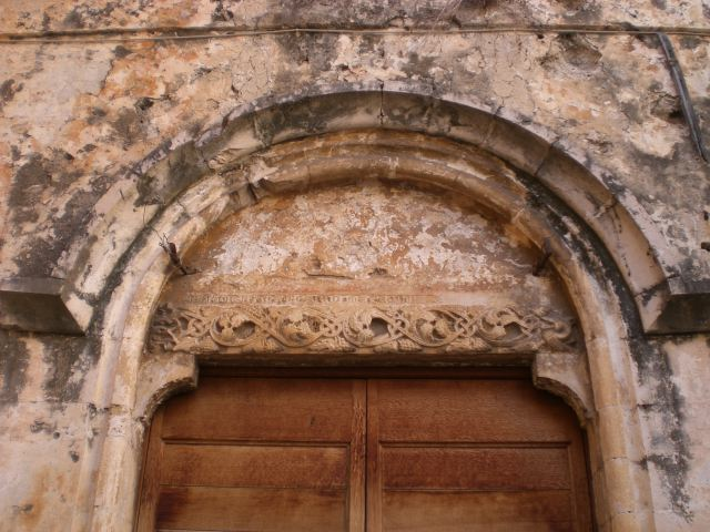 Particolare del portale della Chiesa dell'Annunziata (Terracina)